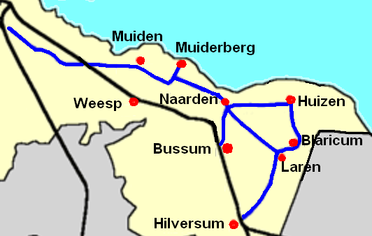 Tracé Gooische Stoomtram